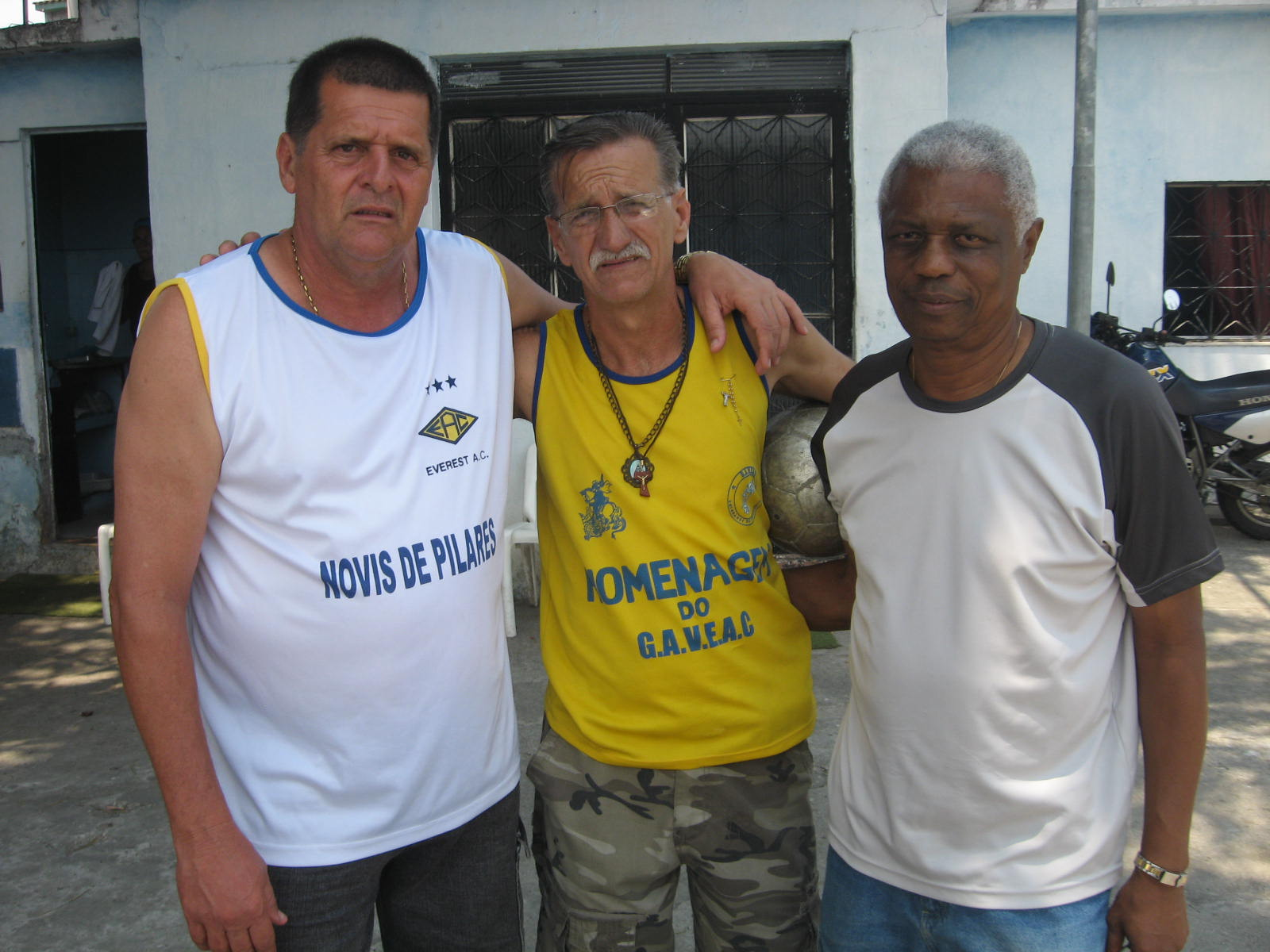 César Novis, Mosquito e Coronel, a diretoria do Everest AC.